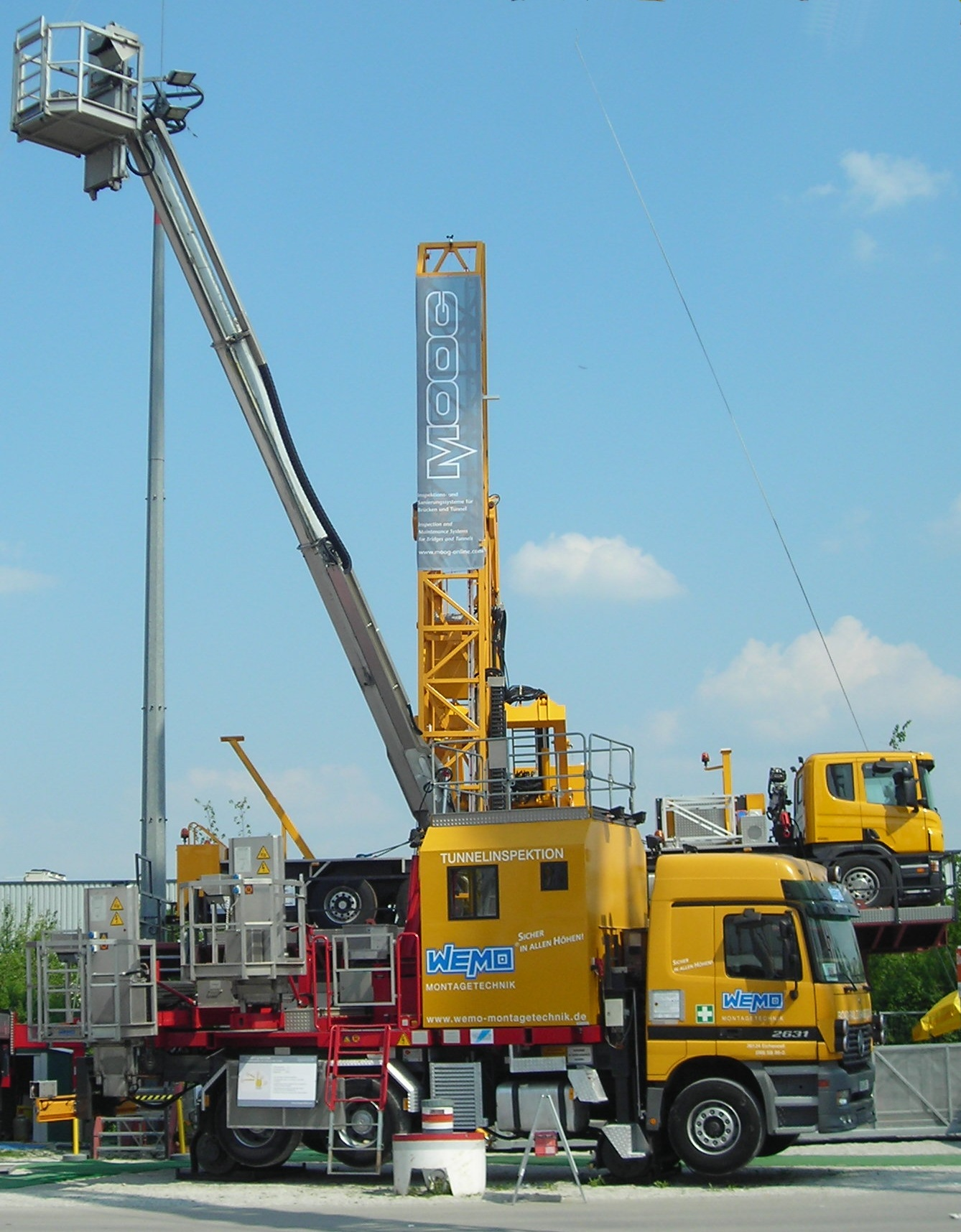 Zweiwegefahrzeug Wemo DC2631 zur Inspektion von Bahnanlagen auf Basis eines Mercedes Benz Actros 2631 (Schweres Nebenfahrzeug). Hersteller: Wemo, Eichenzell (Landkreis Fulda), Exponat auf der Internationalen Fachmesse für Baumaschinen, Baustoffmaschinen, Bergbaumaschinen, Baufahrzeuge und Baugeräte (bauma) in München 2007